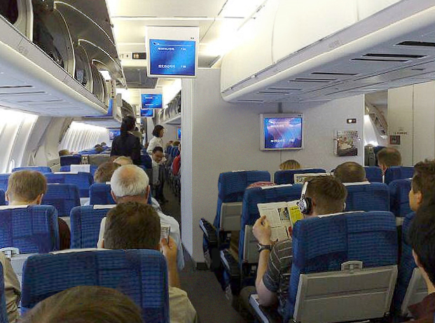 Jumbo jet